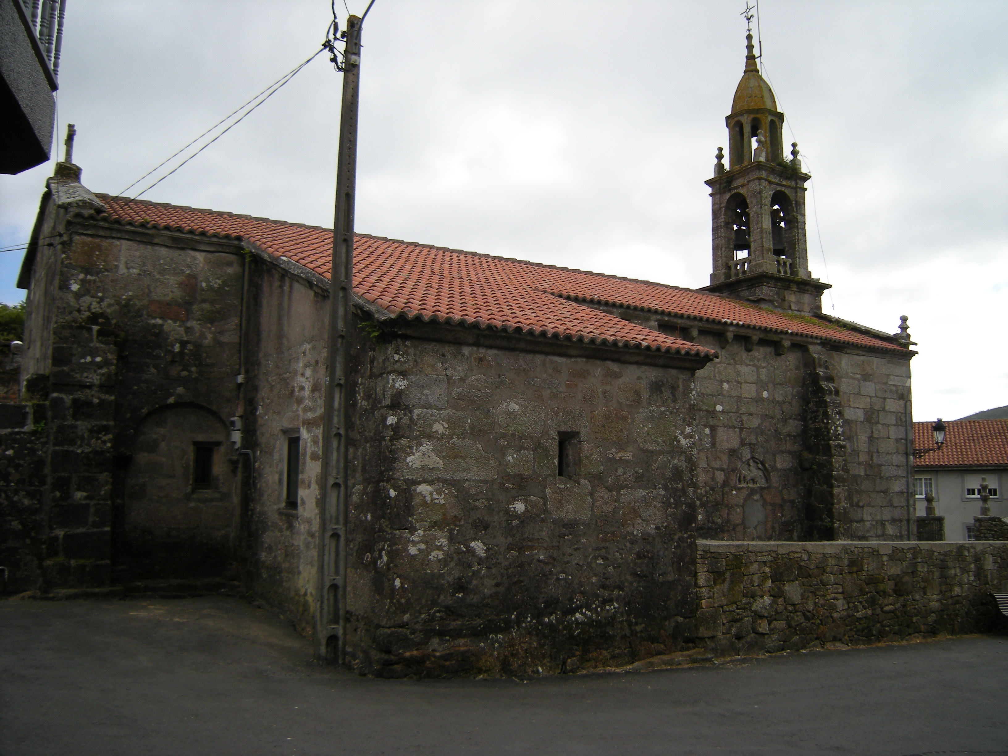 Iglesia de Santo Antoíño de Baíñas